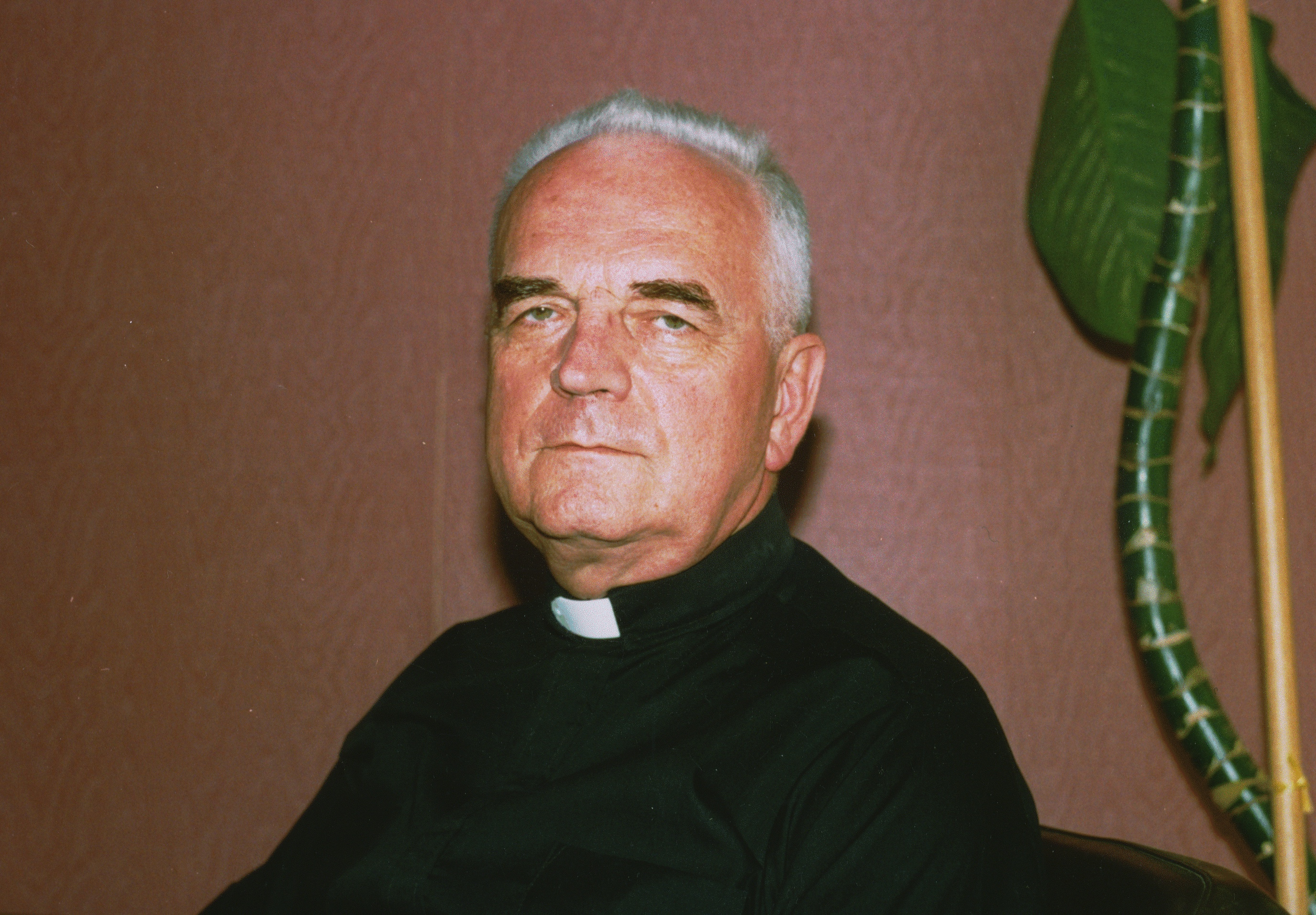 Славомир Мікловш у 1996 році. Photo taken by Jozafát Vladimír Timkovič, OSBM